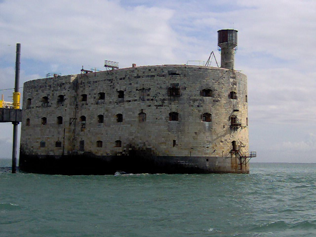 Ile d'Aix, Franciaország